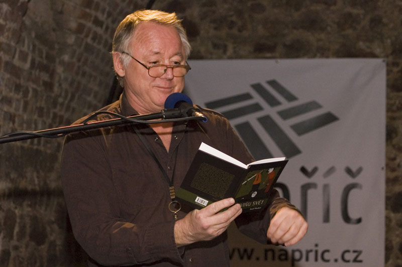 Autorské čtení v Divadle Husa na provázku